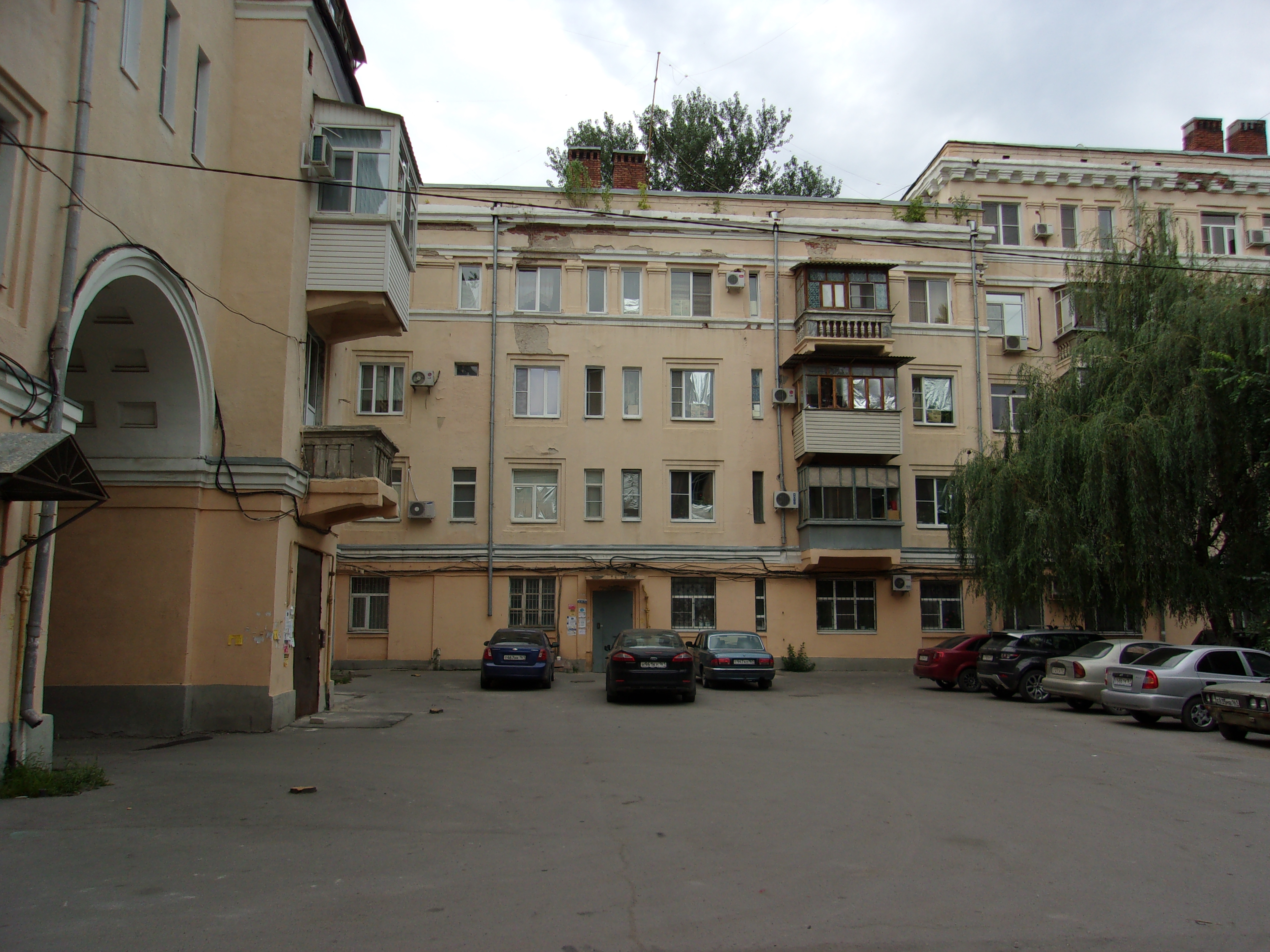 Пятый подъезд дома №36 по улице Гвардейской, г. Новочеркасск. Здесь Чикатило жил до момента своего ареста.